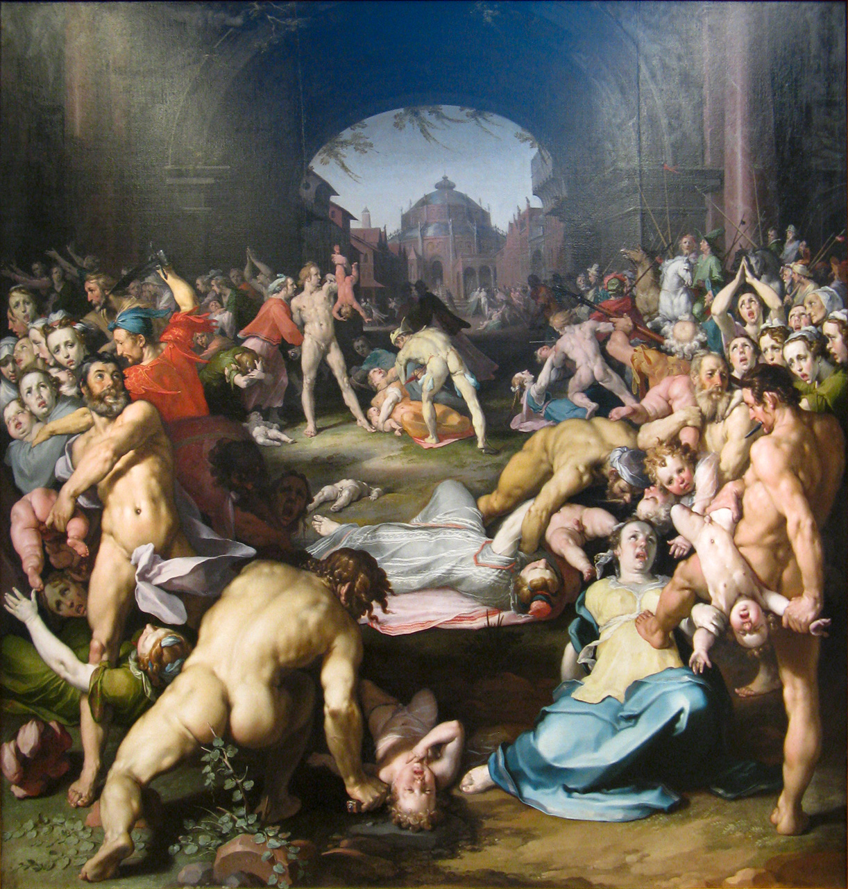 Cornelis Cornelisz van Haarlem – De kindermoord in Bethlehem Haarlem, Cornelis Cornelisz van Haarlem 1562 - Haarlem 1638 De kindermoord te Bethlehem 1591 doek: 268 x 257 cm canvas: 268 x 257 cm